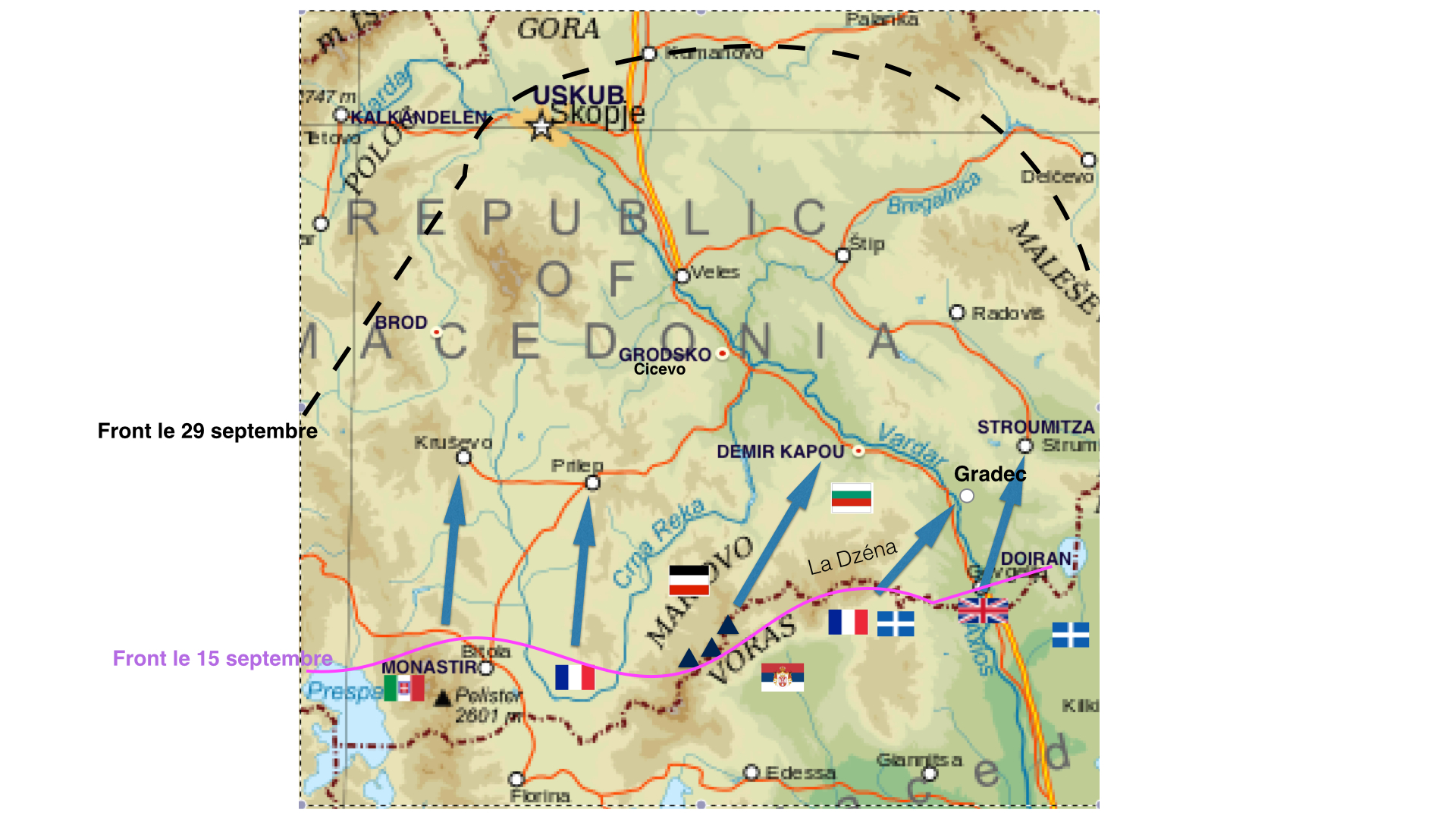 Expédition de Salonique, manœuvre d'Uskub